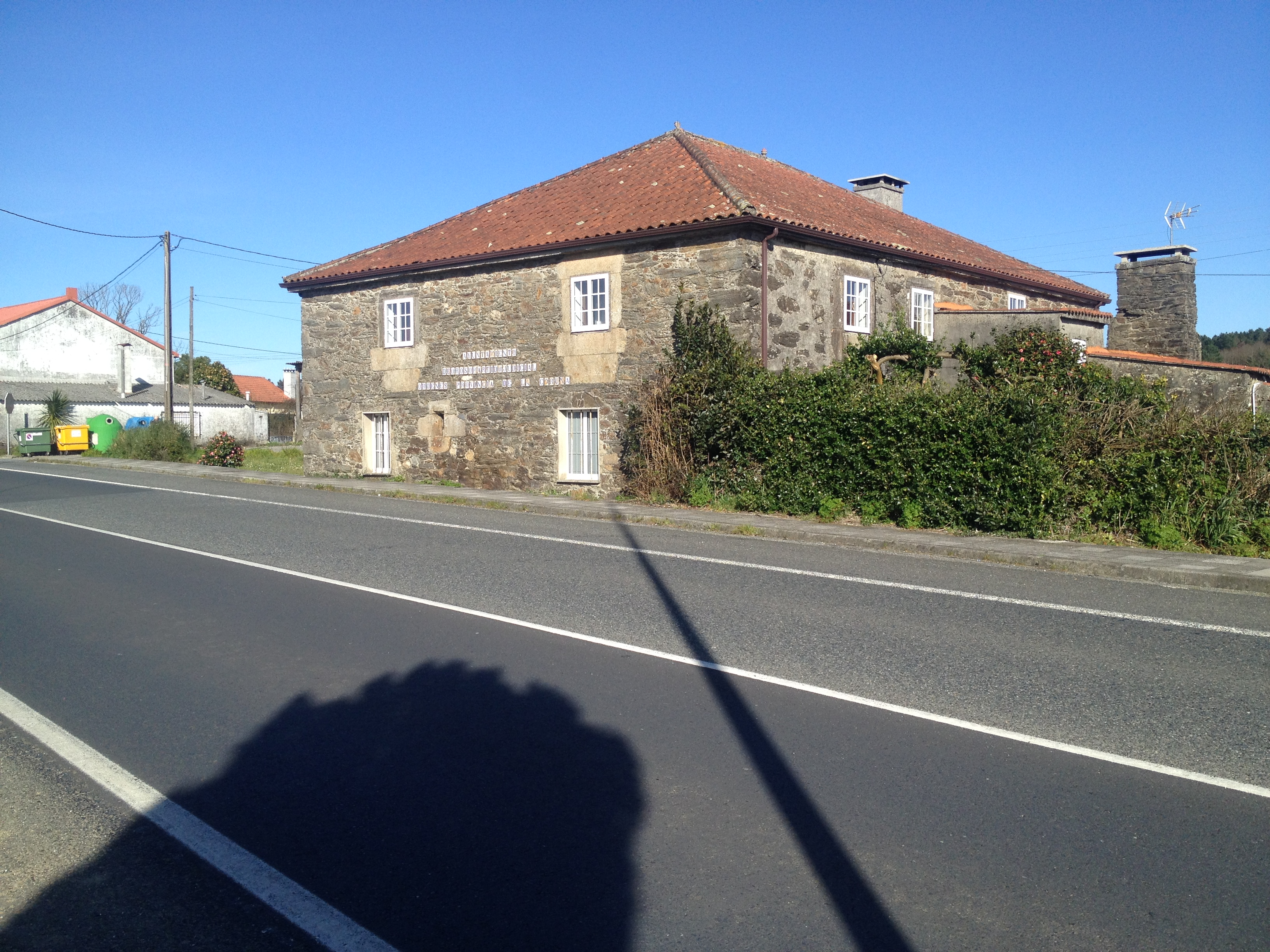 Foto tomada por Brais Salgueiro Gendre de la casa grande de la parroquia de San Martiño de Oroso.